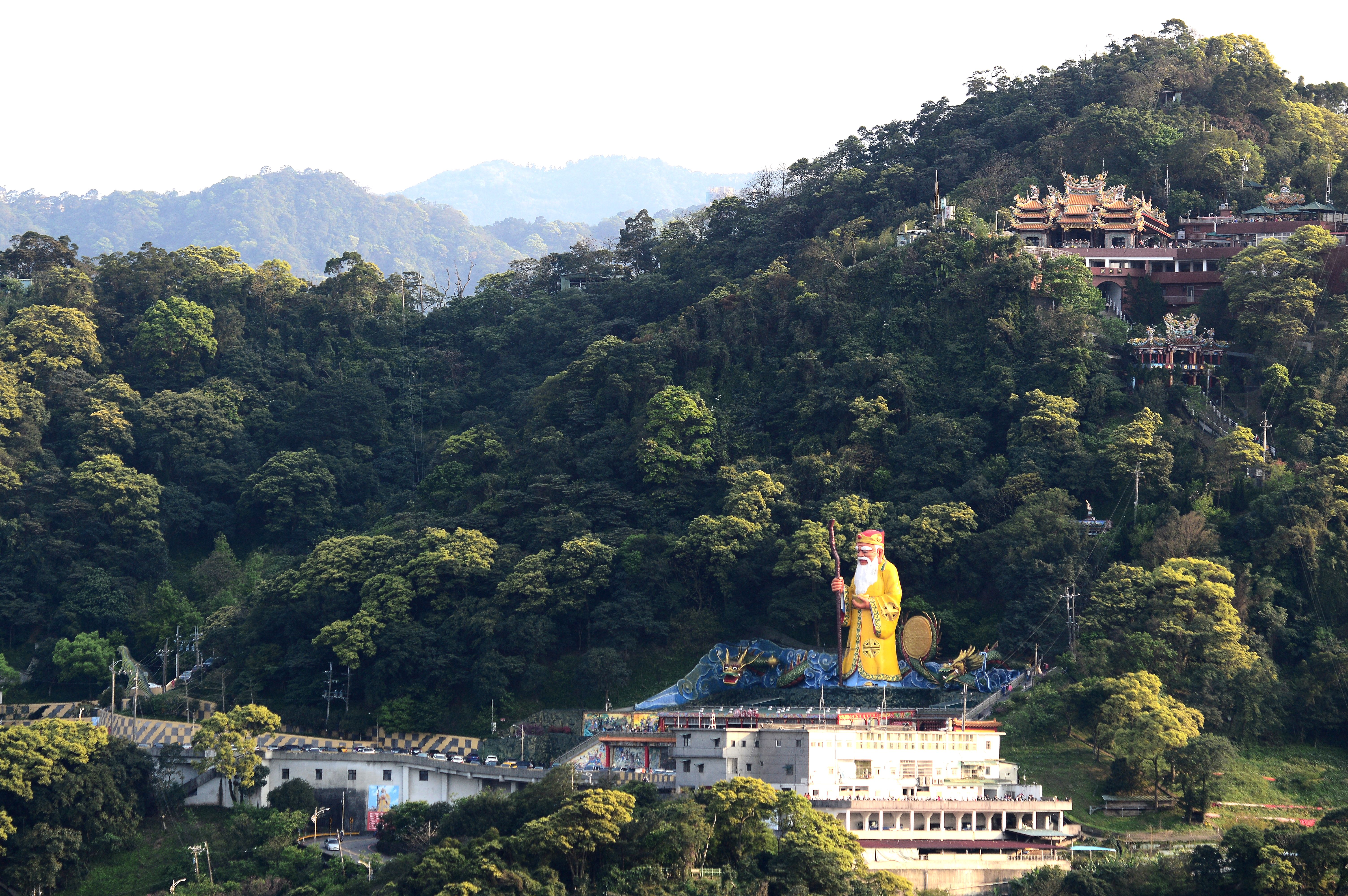 烘爐地南山福德宮